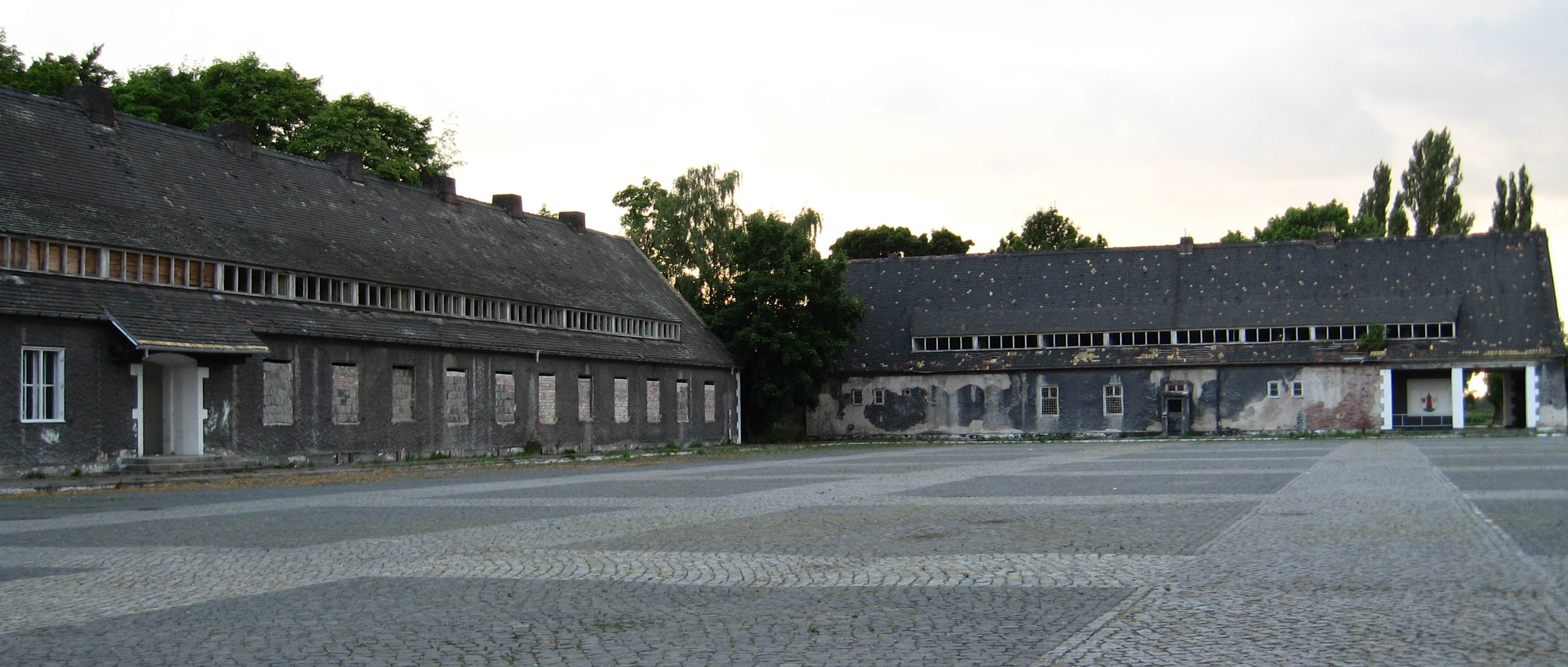 Gebäude auf dem ehemaligen Flugplatz in Köthen (Anhalt)